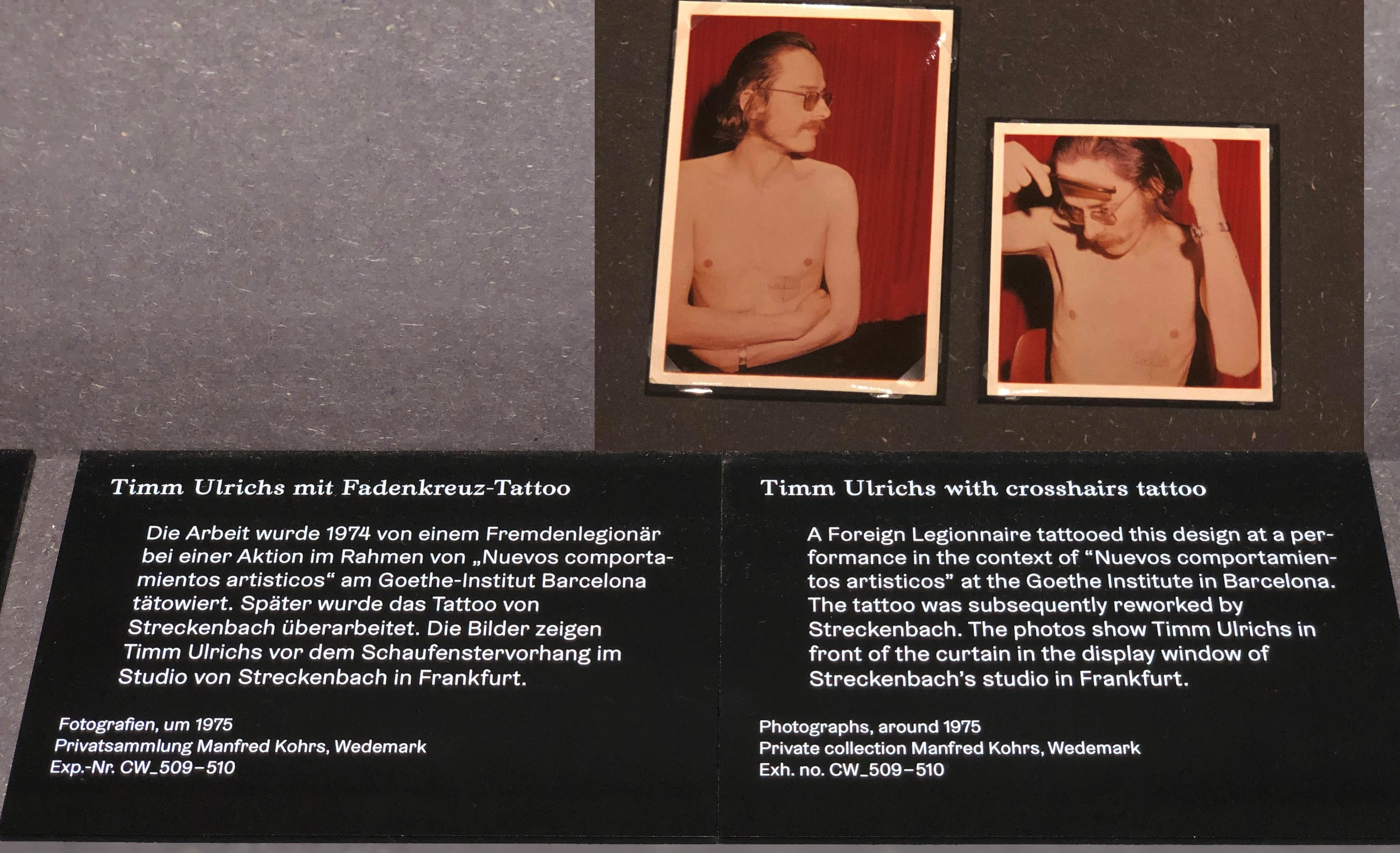 Zwei Bilder in der Vitrine "Abteilung Streckenbach / Kohrs / Ulrichs" in der Ausstellung "TATTOO-LEGENDEN - Christian Warlich auf St. Pauli" 2019/2020 im Museum für Hamburgische Geschichte.